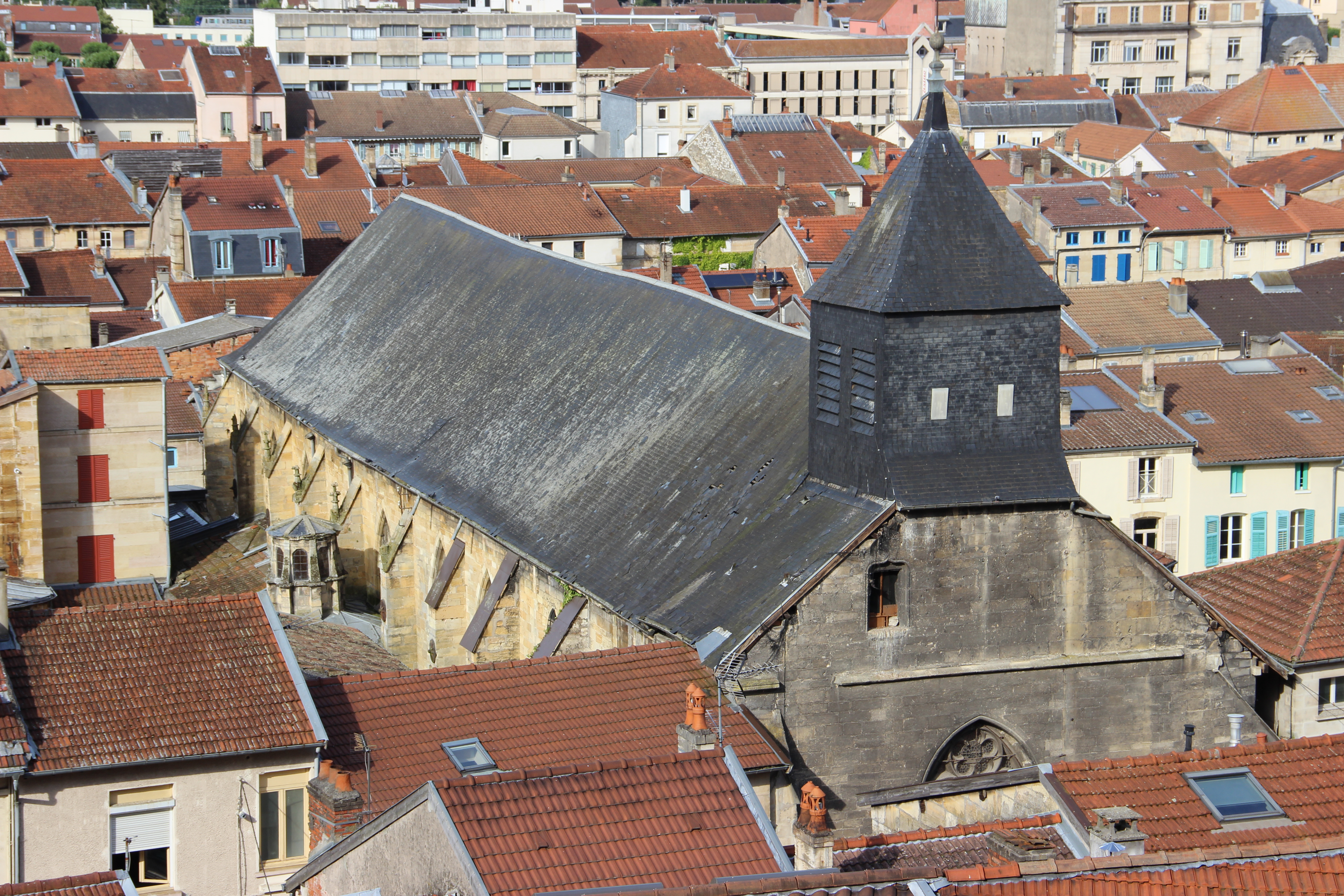 L'église Saint-Antoine.